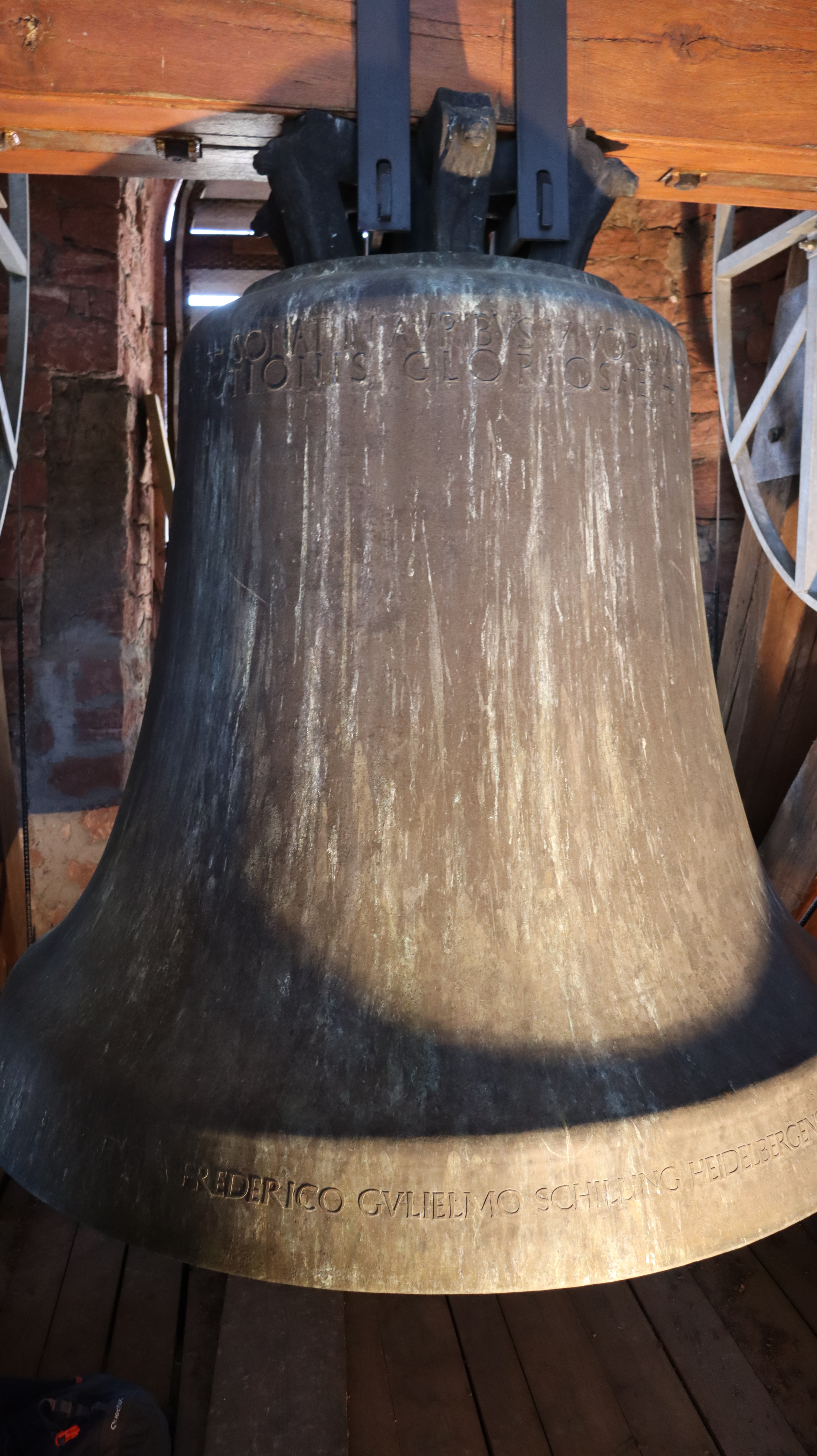 Große Glocke der kath. Pfarrkirche Sankt Jakobus in Miltenberg.